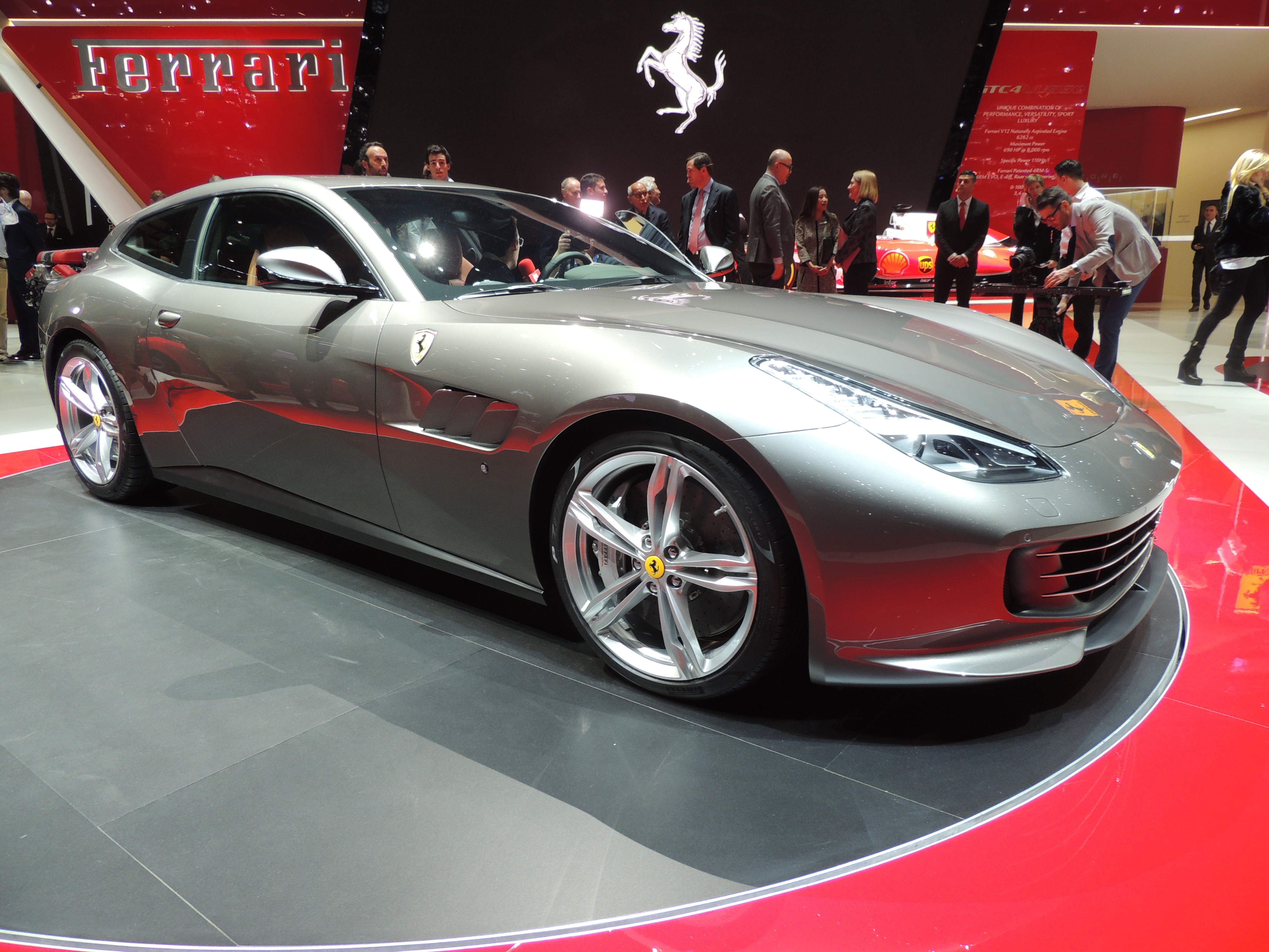 Ferrari GTC4 Lusso, salon de Genève 2016